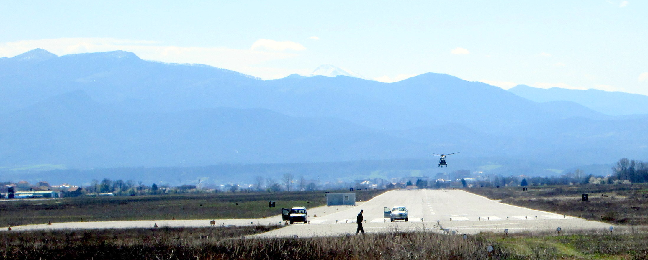 Aeroporti i Gjakovës